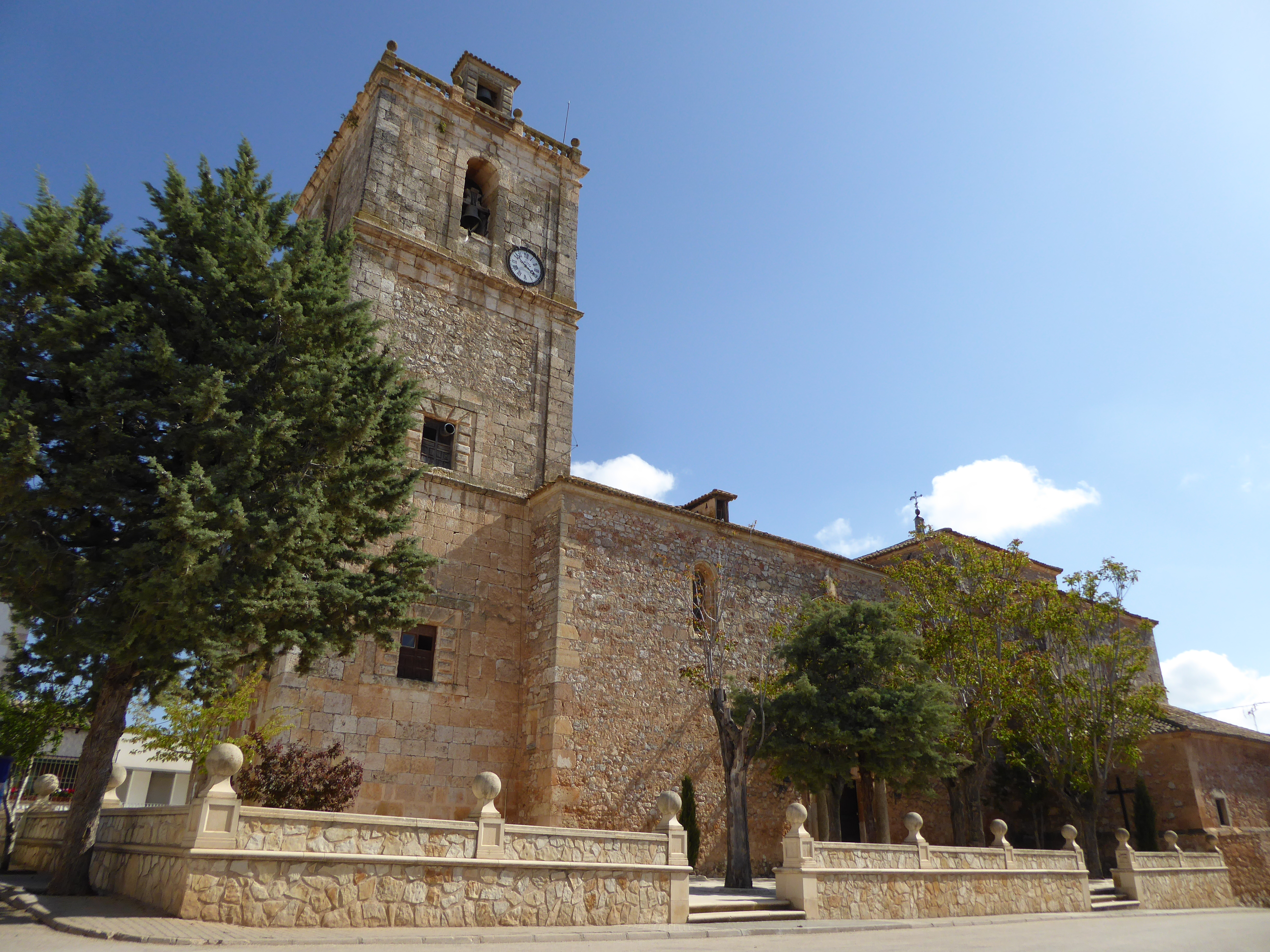 Los Hinojosos